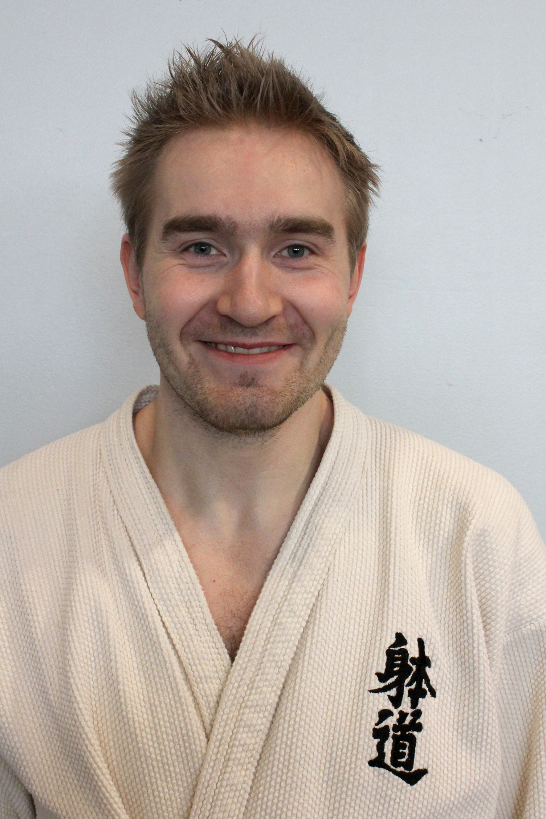 Aki Peltola